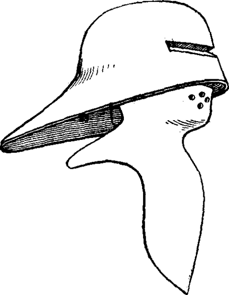 «Нямецкі» салад і барт.